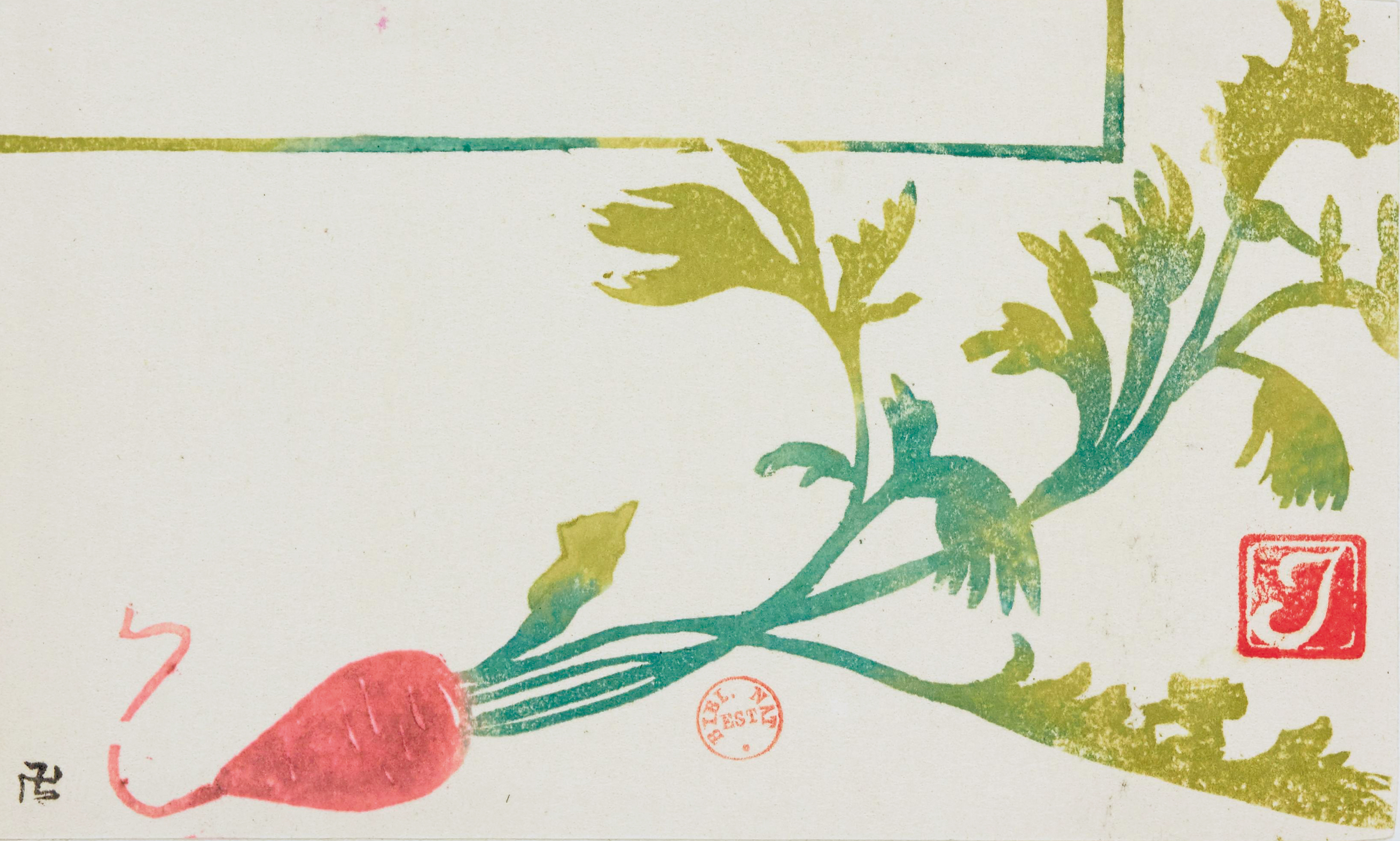 Estampe